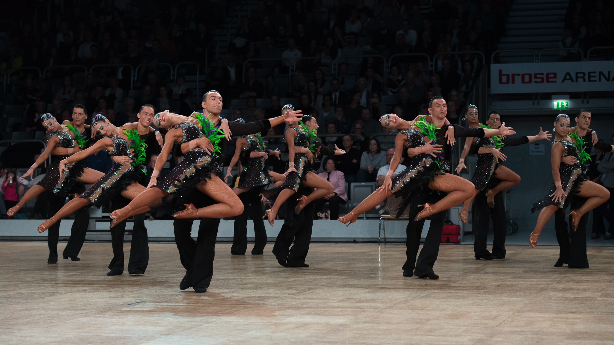 Brose Arena Bamberg,Deutsche Meisterschaften der Formationen Standard & Latein 2016,Latein,Soar,TSC Residenz Ludwigsburg,Tanzsport